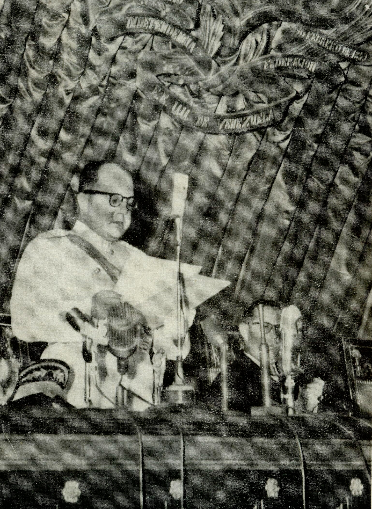 Marcos Pérez Jiménez leyendo su alocución luego de haber sido juramentado como «Presidente Constitucional» por parte del Congreso de Venezuela.